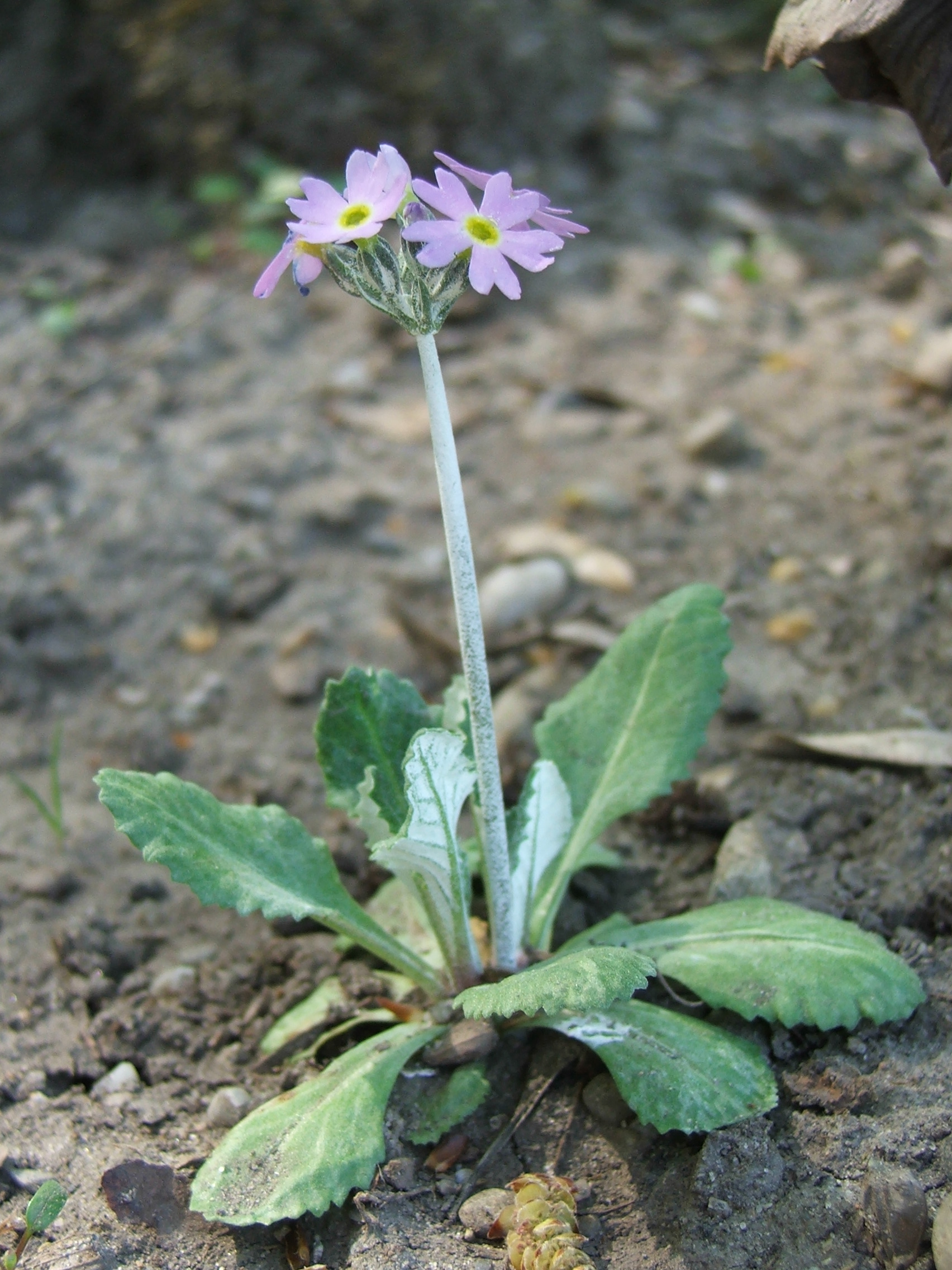 Primula laurentiana Fernald. MTA Botanic Garden Vácrátót, Hungary.